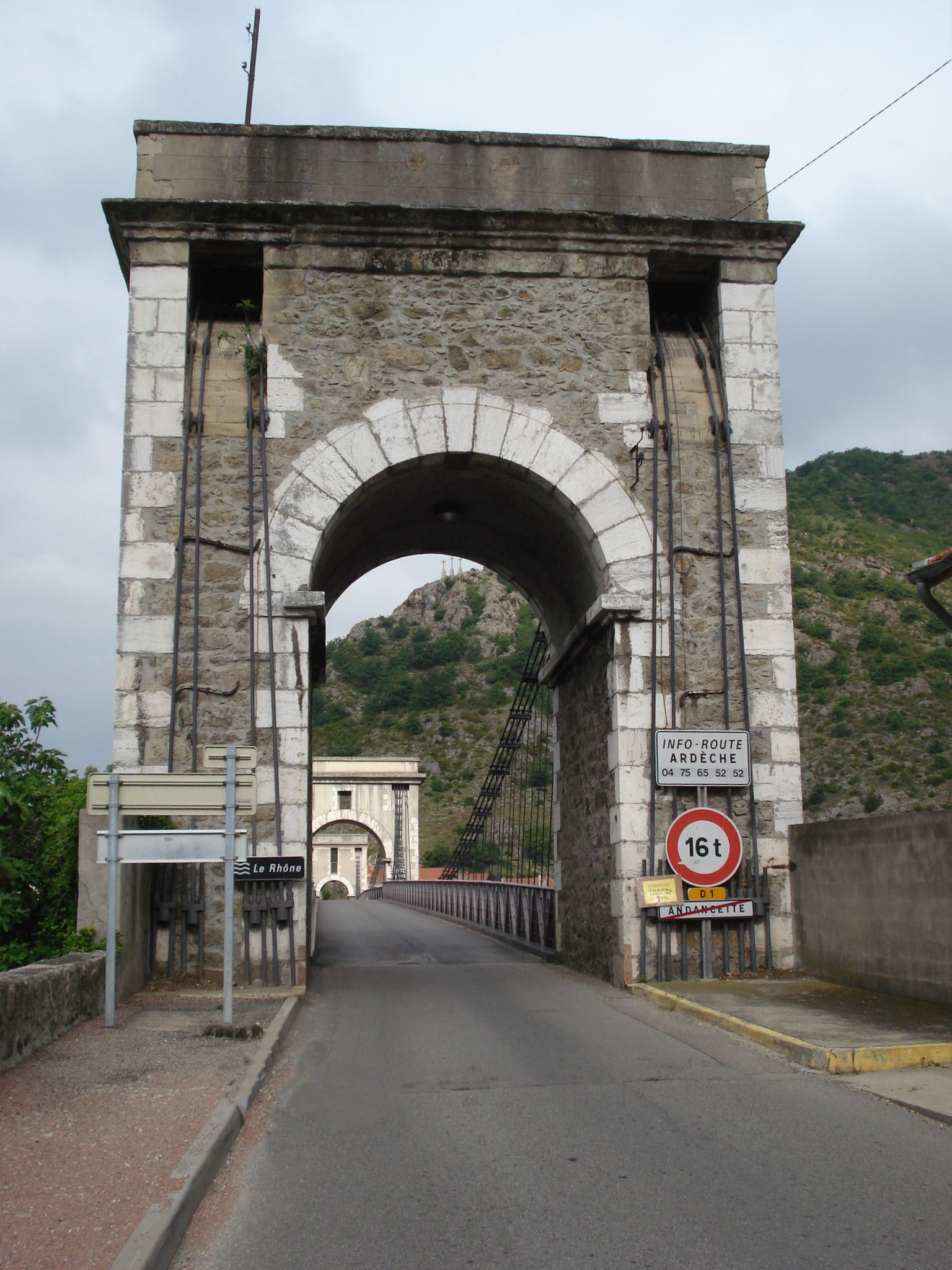 pont suspendu Marc Seguin au-dessu du Rhône, entre l'Ardèche et la Drôme, entre Andance et Andancette